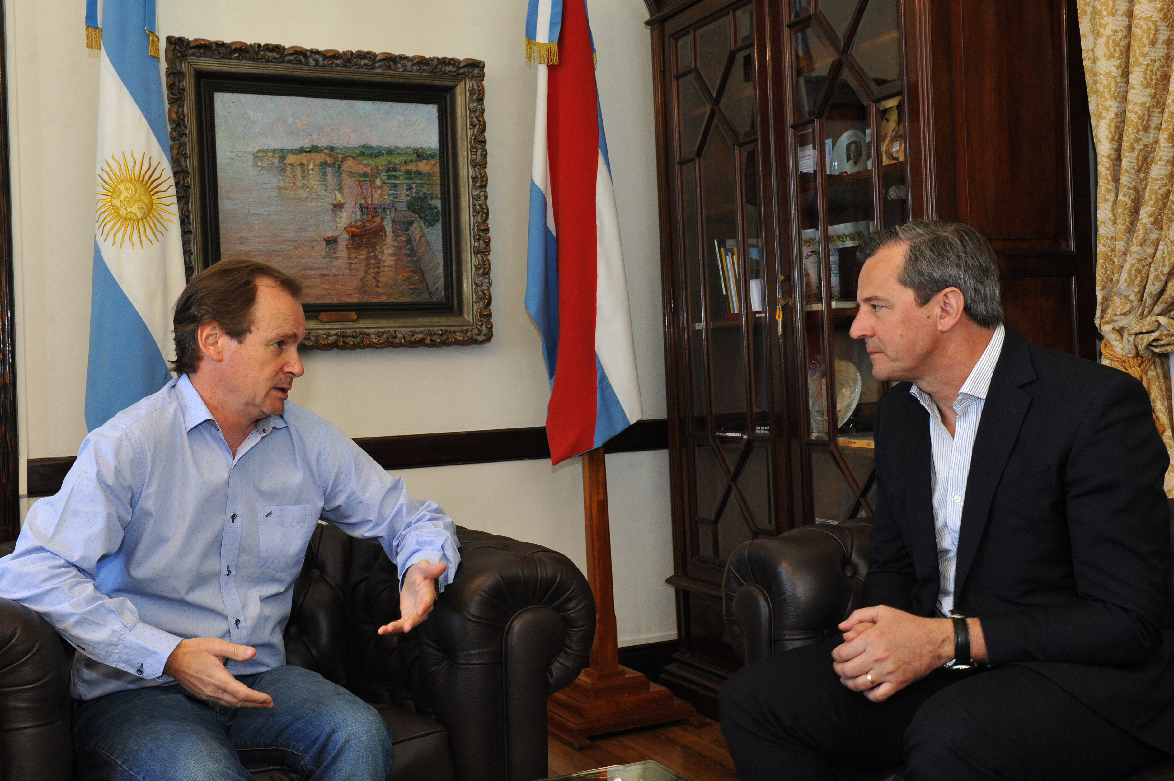 El Gobernador de Entre Ríos, Gustavo Bordet, mantuvo un encuentro junto al Vicegobernador Adán Humberto Bahl con motivo de cumplirse nueve meses de su gestión.